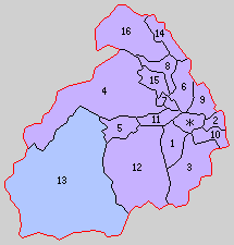 青森県中津軽郡の町村。